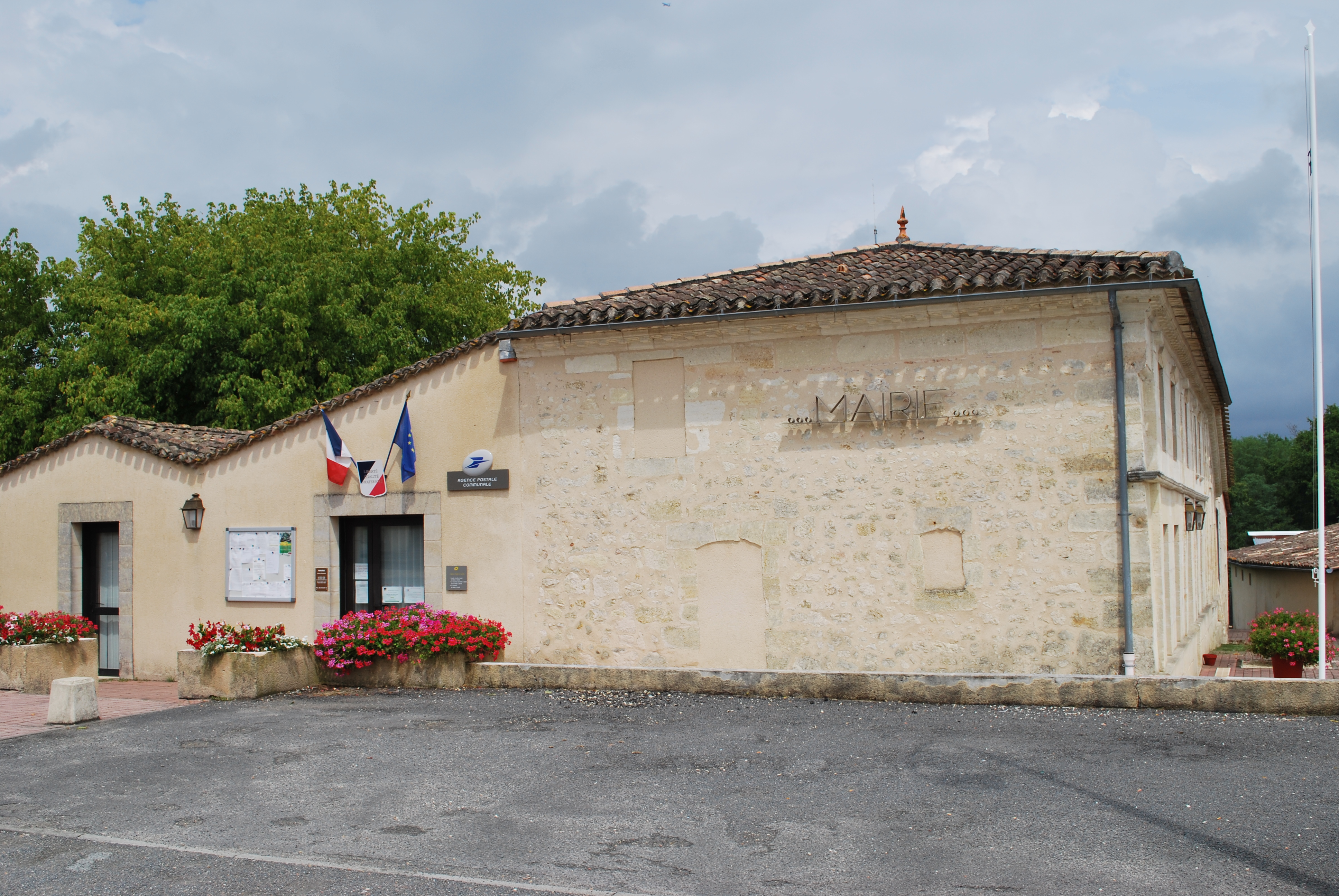 Marcenais église templière